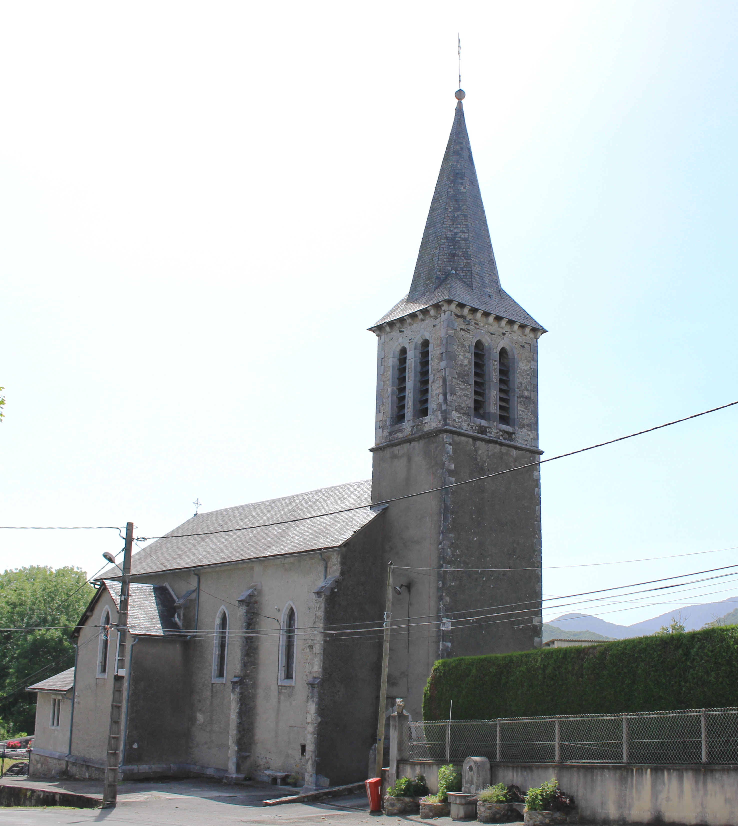 Église Saint-Lizier d'Izaux (Hautes-Pyrénées, France).